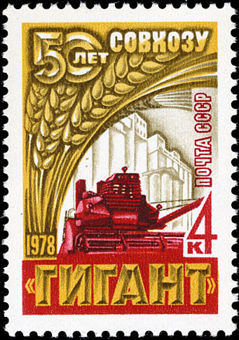 Почтовая марка СССР - зерносовхоз "Гигант"